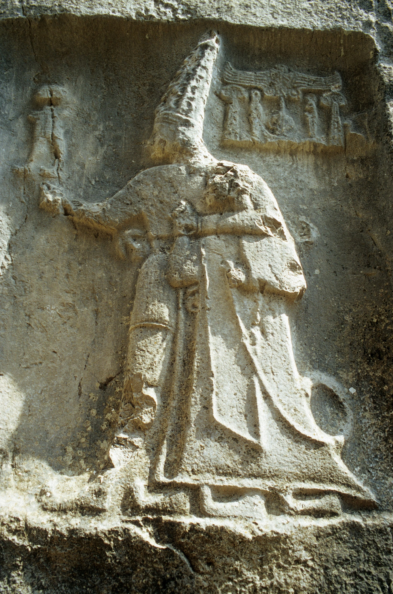 Yazilikaya, hethitisches Heiligtum bei Hattusa, Türkei, Kammer B Tudhalija IV. mit Schutzgott Scharruma